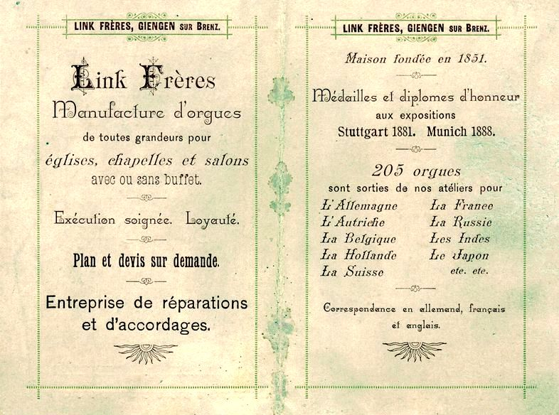 Prospectus en Français de la manufacture d'orgue Link, datant de 1891 et retrouvé à l'intérieur de l'orgue de Mirepoix, France.